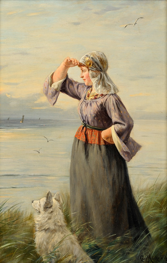 Warten auf den Liebsten. Signiert. Öl auf Holz, 42 x 28 cm